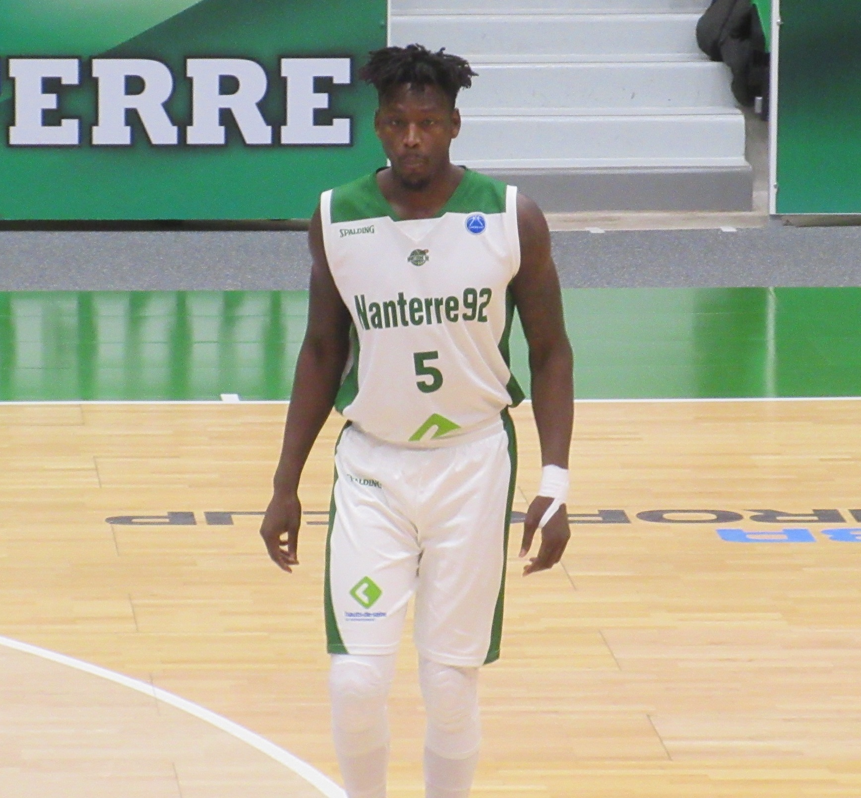 Talib Zanna avec le maillot de Nanterre 92